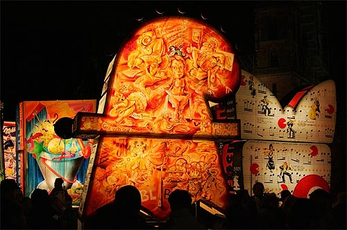 Basler Fasnacht 05: Ladäärne-Uustellig (Münsterplatz)